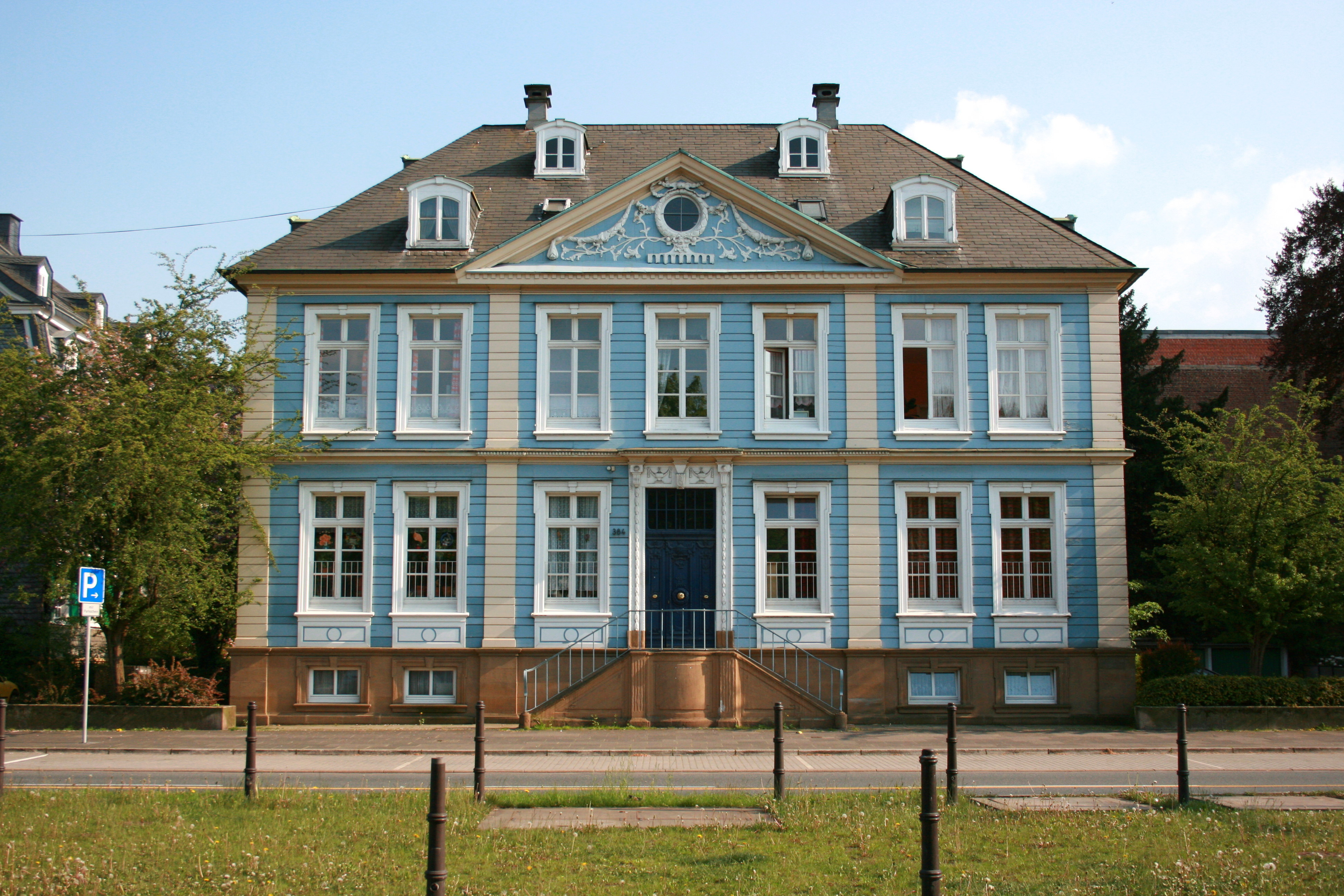 Haus Barthels in Wuppertal